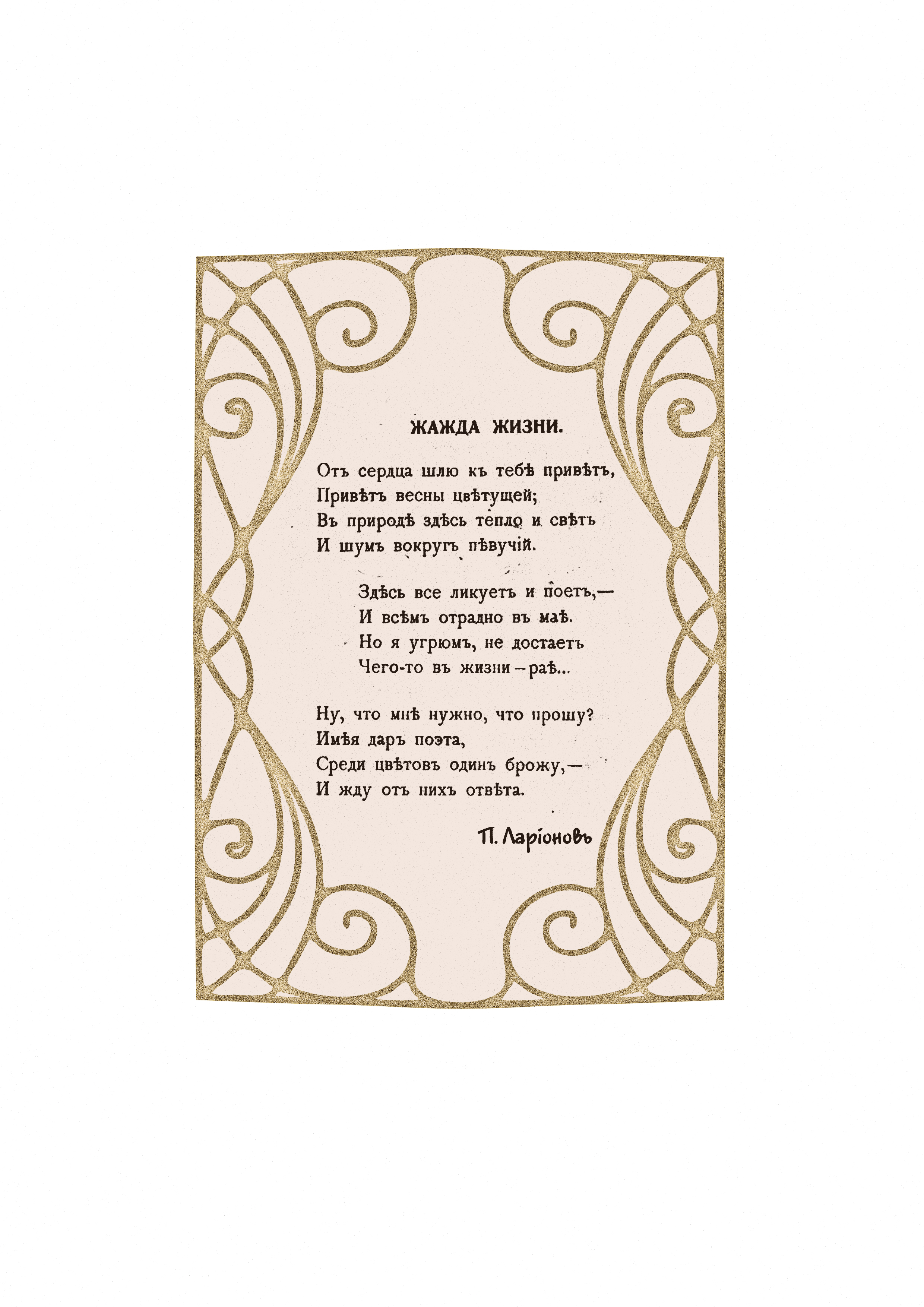 Петр Андреевич Ларионов «Жажда жизни»